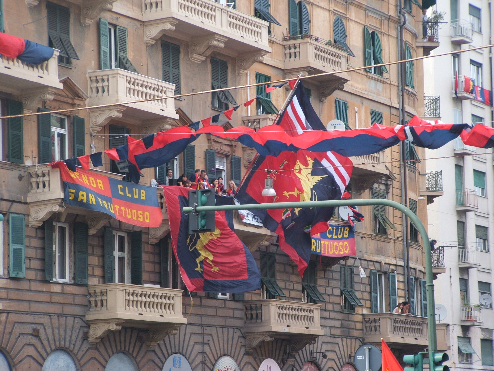 Genova, festeggiamenti per la promozione del Genoa CFC in Serie A